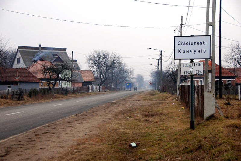 Crăciuneşti, Maramureş, Rumänien – Ortseingang, von Sighetu Marmaţiei kommend